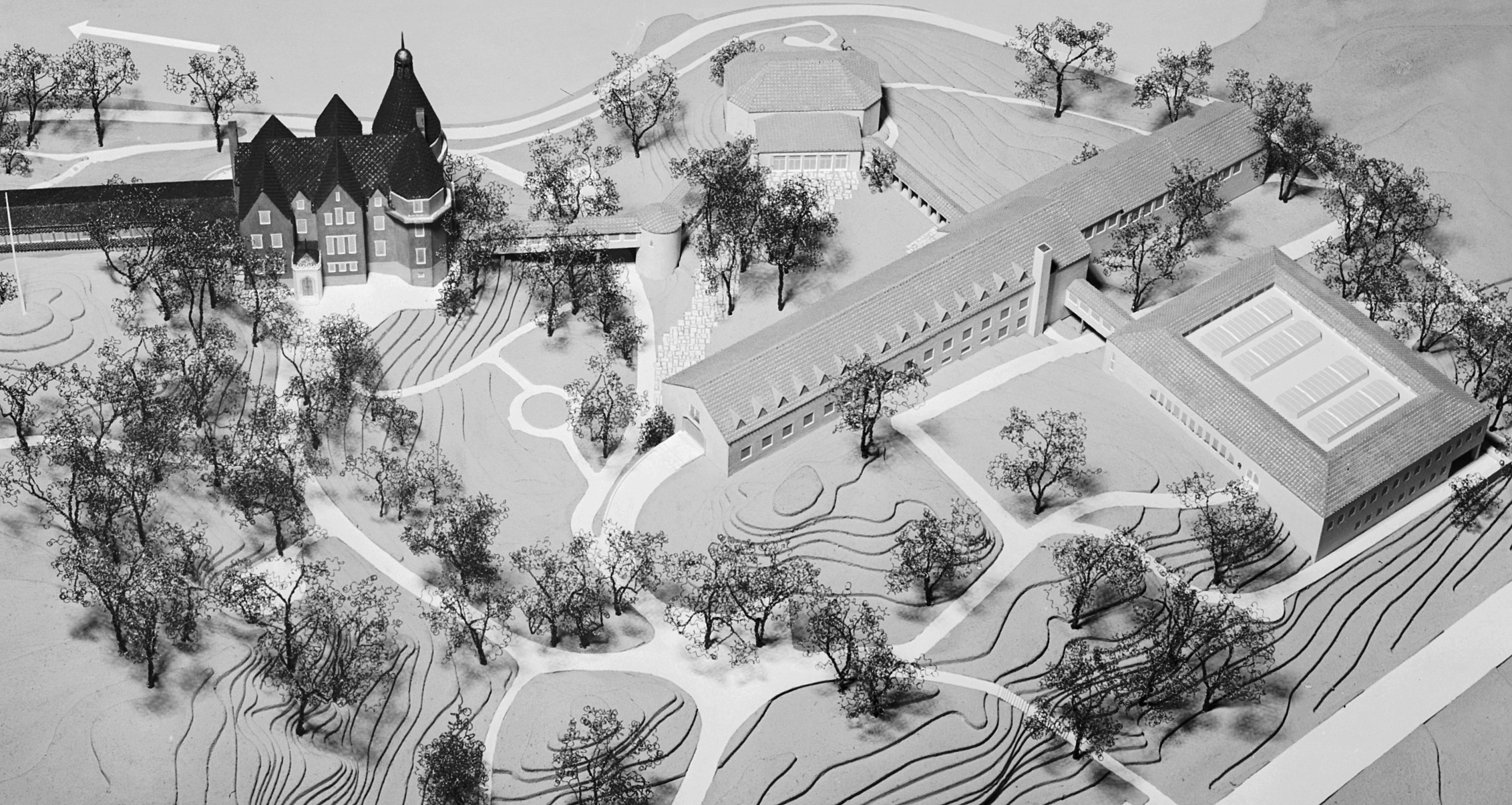 Modell för konferensanläggningen Vår Gård, arkitekt Dag Ribbing